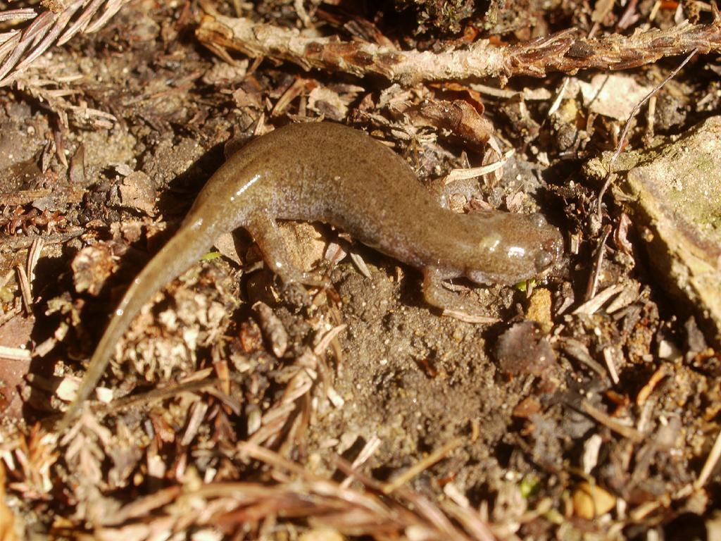 Hynobius nebulosus：カスミサンショウウオ 2010/02/28 和歌山県田辺市：Tanabe city, Wakayama pref. Japan